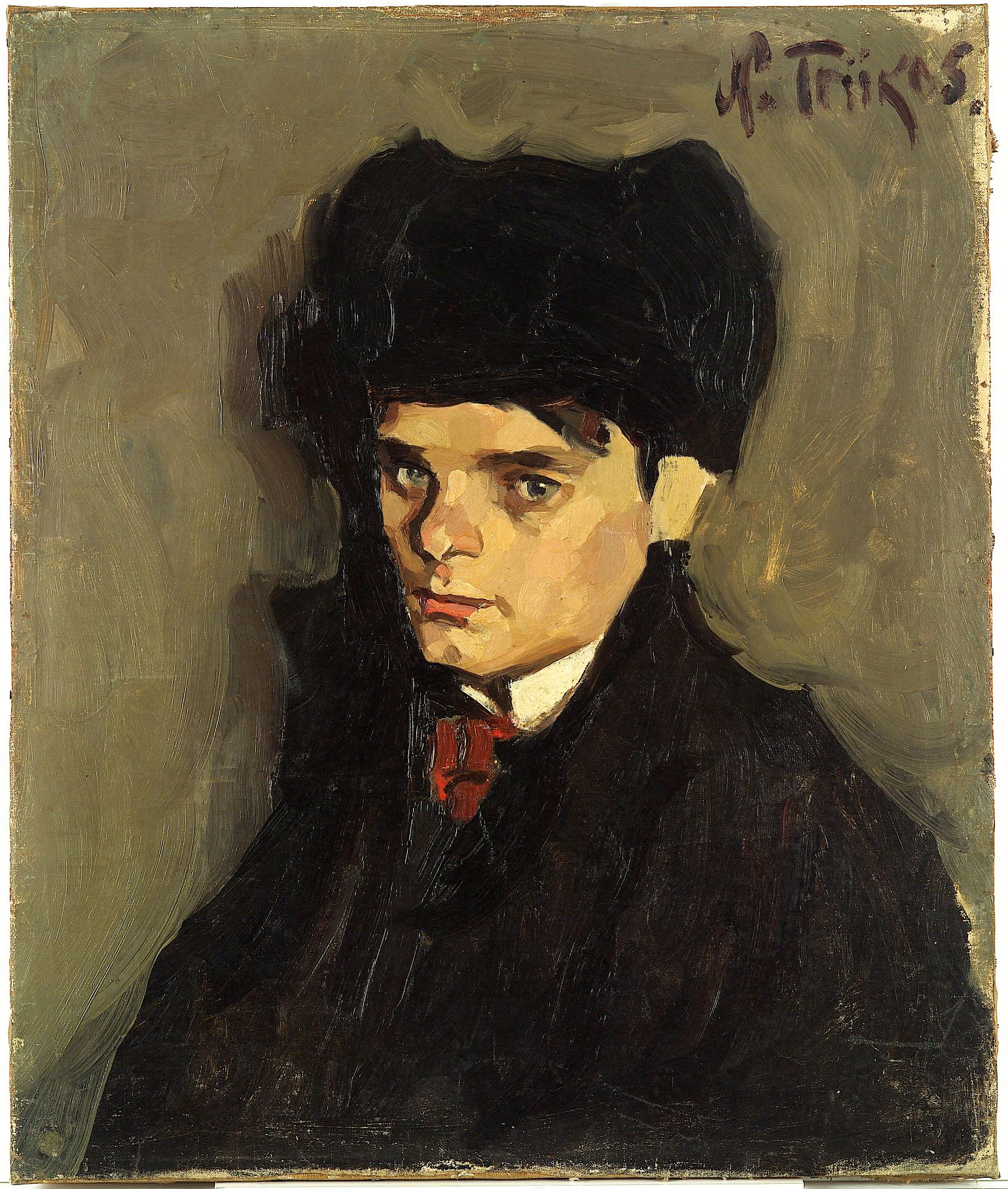 Muuseumikogu Maal Olemus maal Originaal originaal Kunstiese Säilivus rahuldav